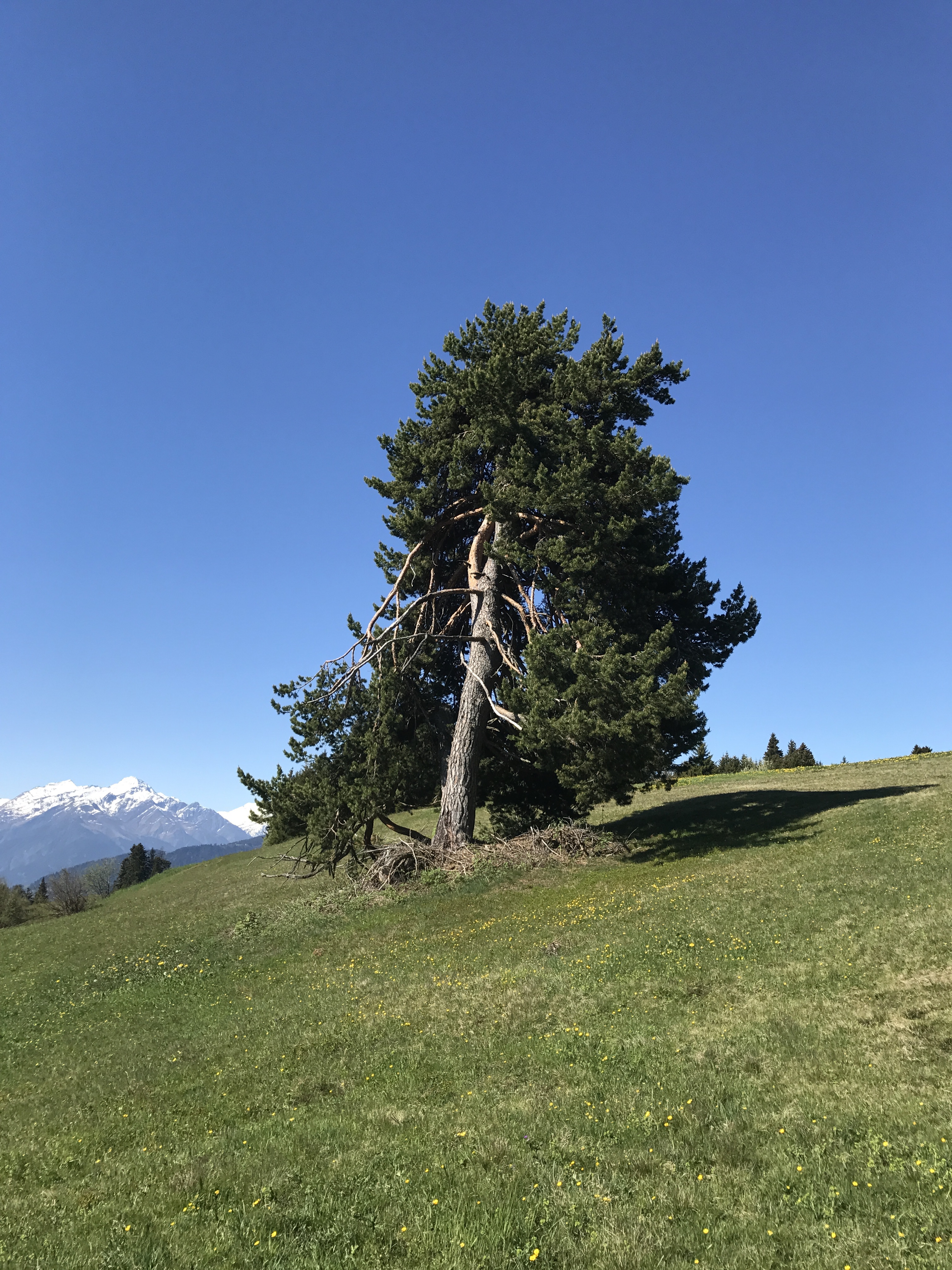 Wettertanne (Föhre) in der Surselva